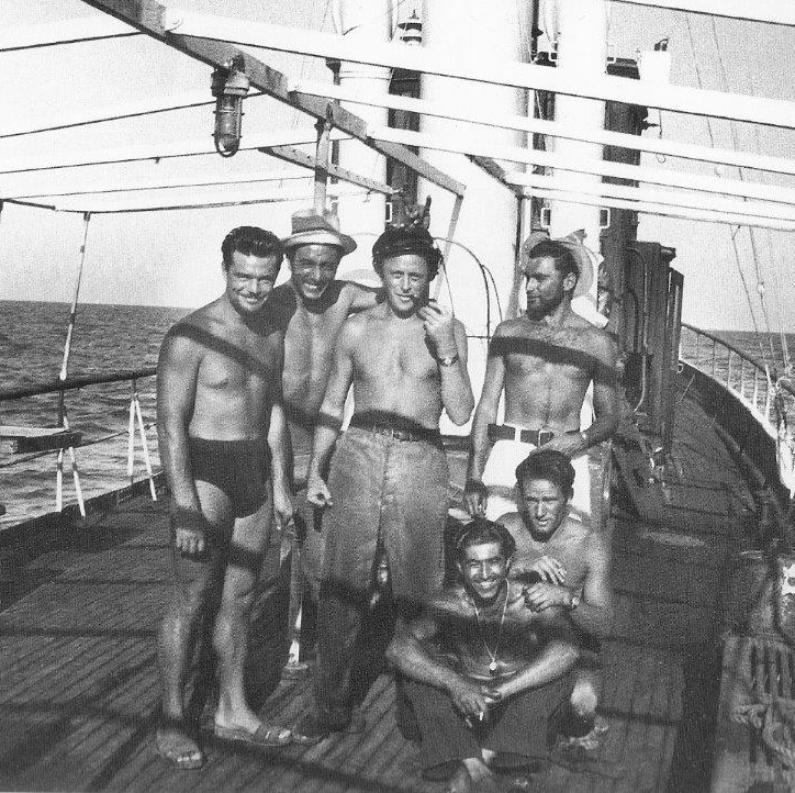 יוחאי בן נון ראשון מימין עם הצוות איטלקי על סיפון היכטה אלבטרוס השחף